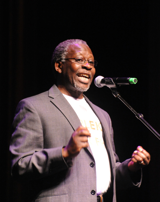 Richard Sseruwagi at Fadimedagarna 2014, Berns Salonger, Stockholm, Sweden.